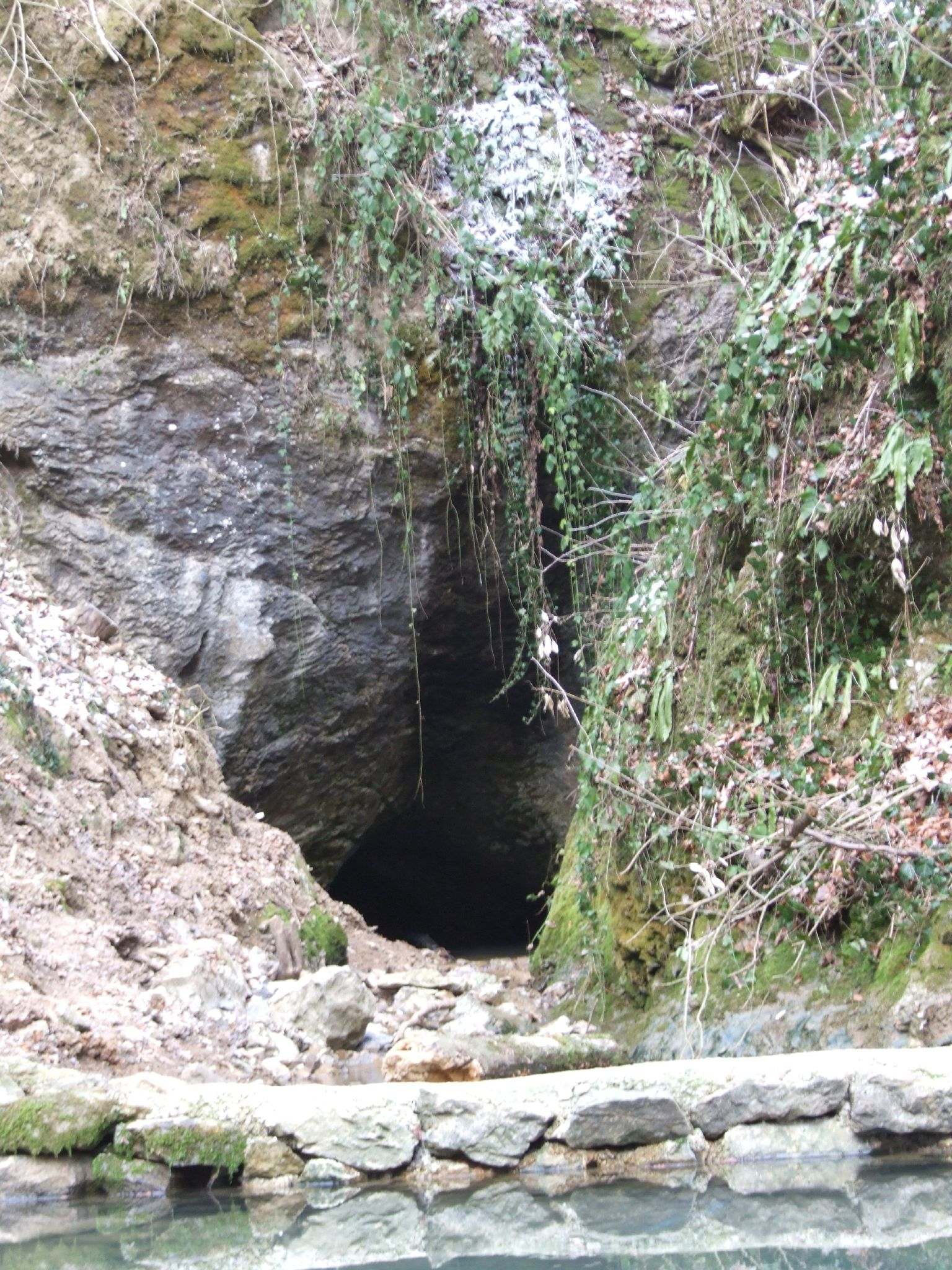 Grota urşilor cave near Moneasa spa resort, Arad County, Romania